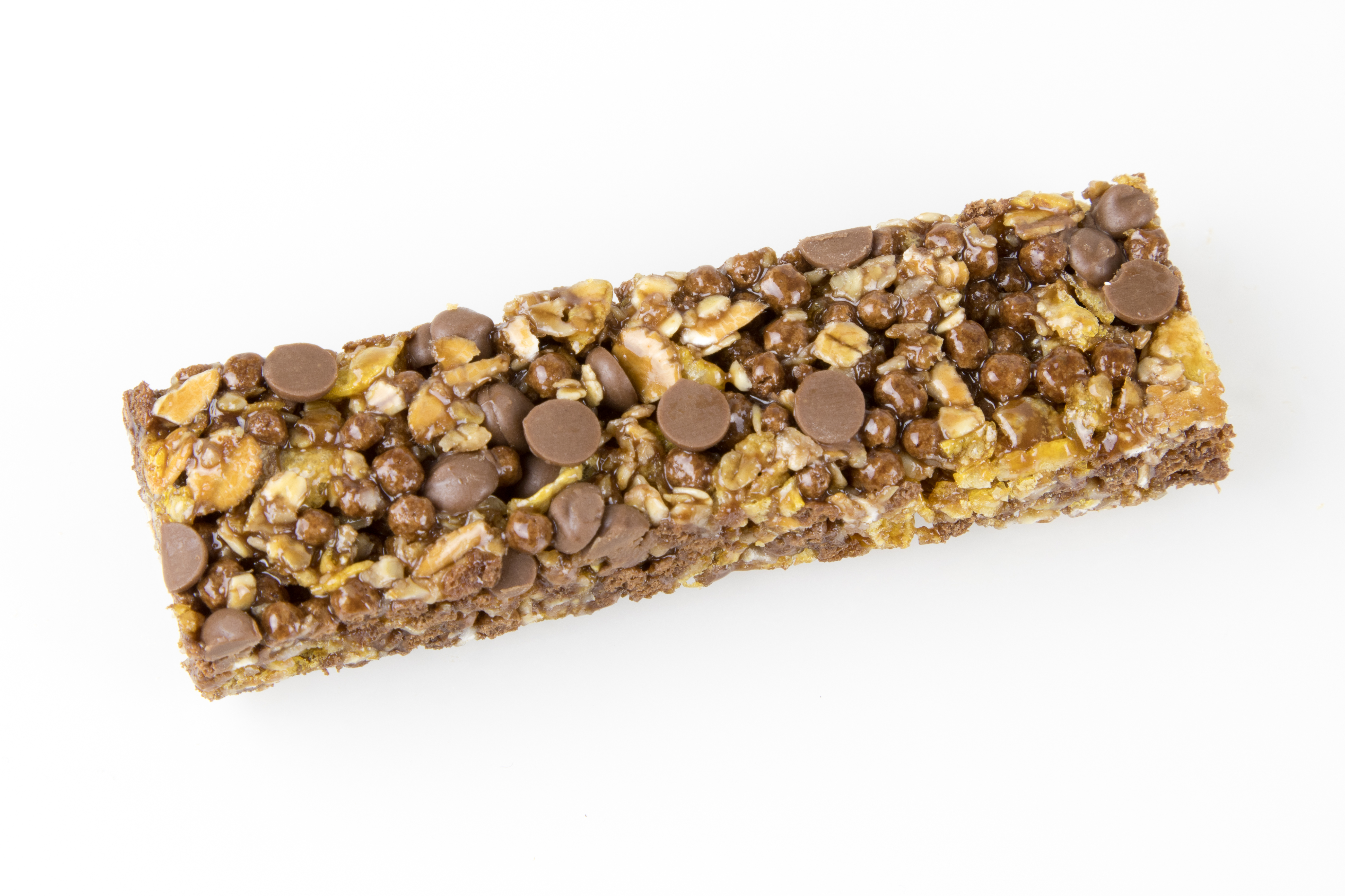 Muesliriegel Marke "Alnatura Müsli Schoko"